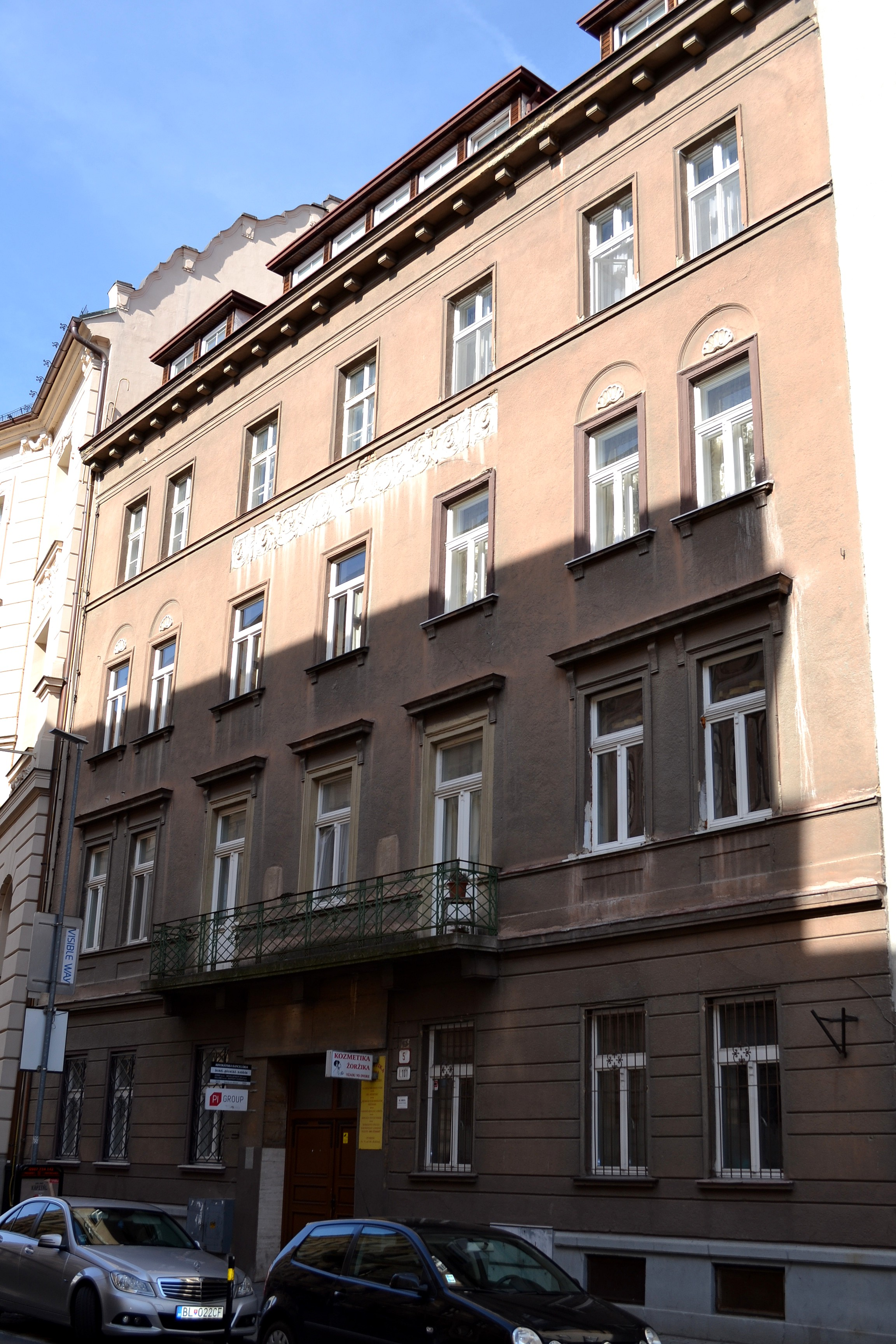 Medená ul. č. 5. Celkový pohľad na budovu